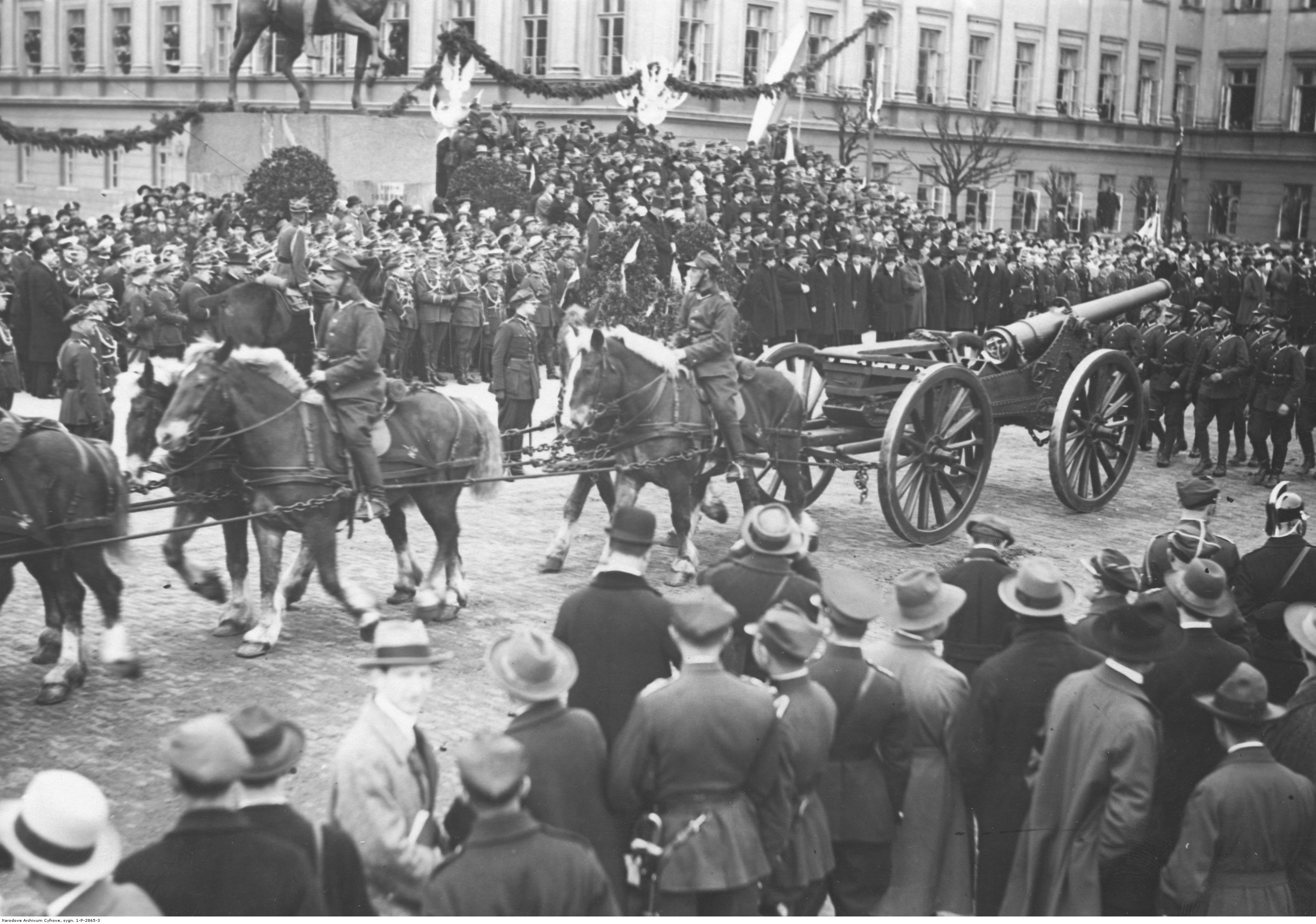 Uroczystości święta 3 Maja na Placu Saskim w Warszawie - defilada wojskowa. Przemarsz oddziałów ciężkiej artylerii ze 120 mm armatą polową mle 1878 De Bange. W tle fasada Pałacu Saskiego. Koncern Ilustrowany Kurier Codzienny - Archiwum Ilustracji. Sygnatura: 1-P-2865-3